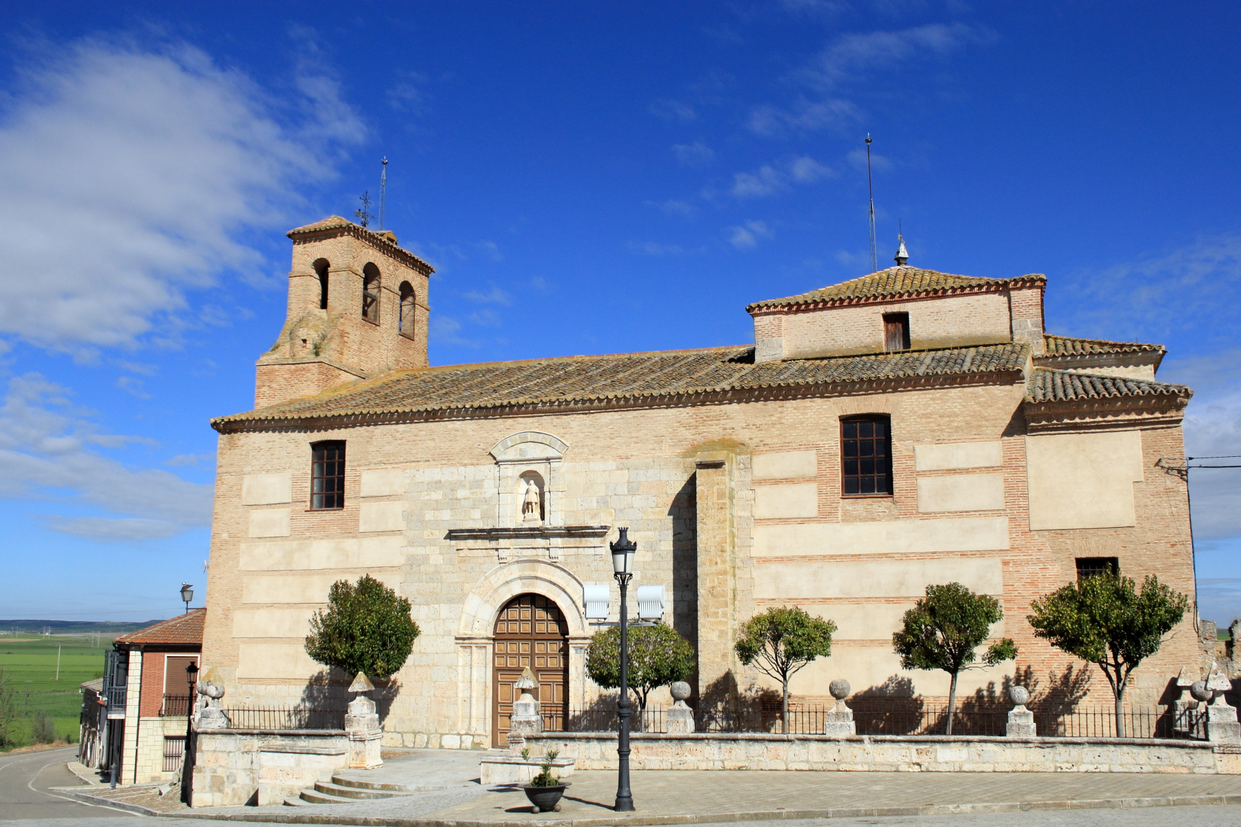 Iglesia parroquial de San Juan Bautista. Villalar de los Comuneros, Provincia de Valladolid, Castilla y León, España